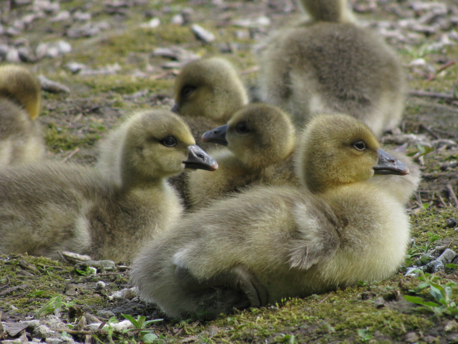 Pairi Daiza